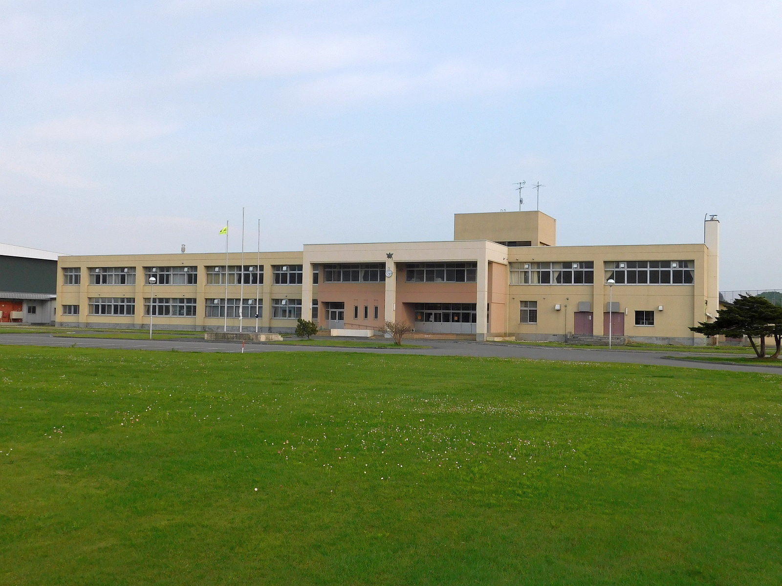 北海道天塩郡豊富町にある北海道豊富高等学校の校舎遠景